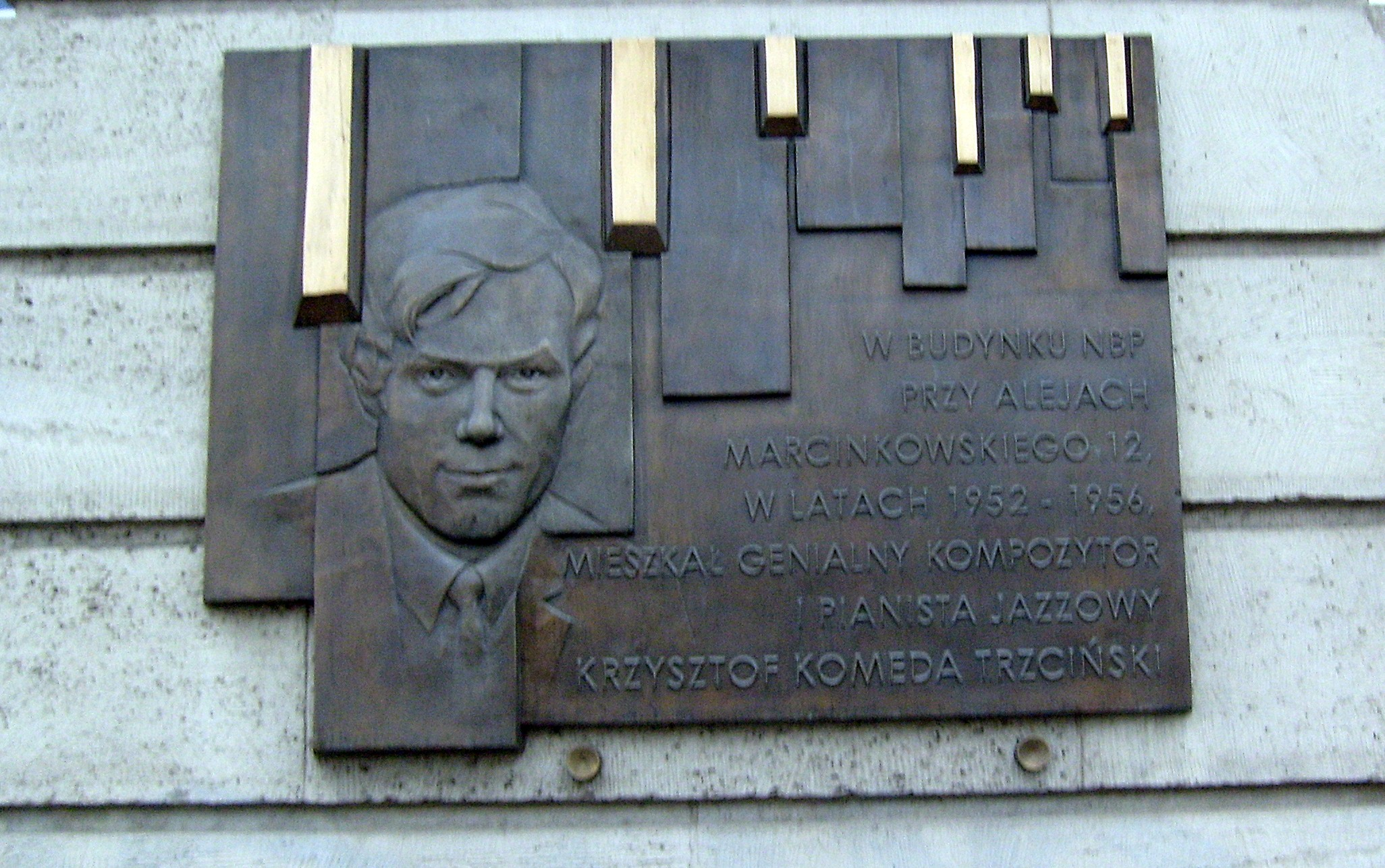 Tablica na budynku przy al. Marcinkowskiego w Poznaniu, K. Komeda